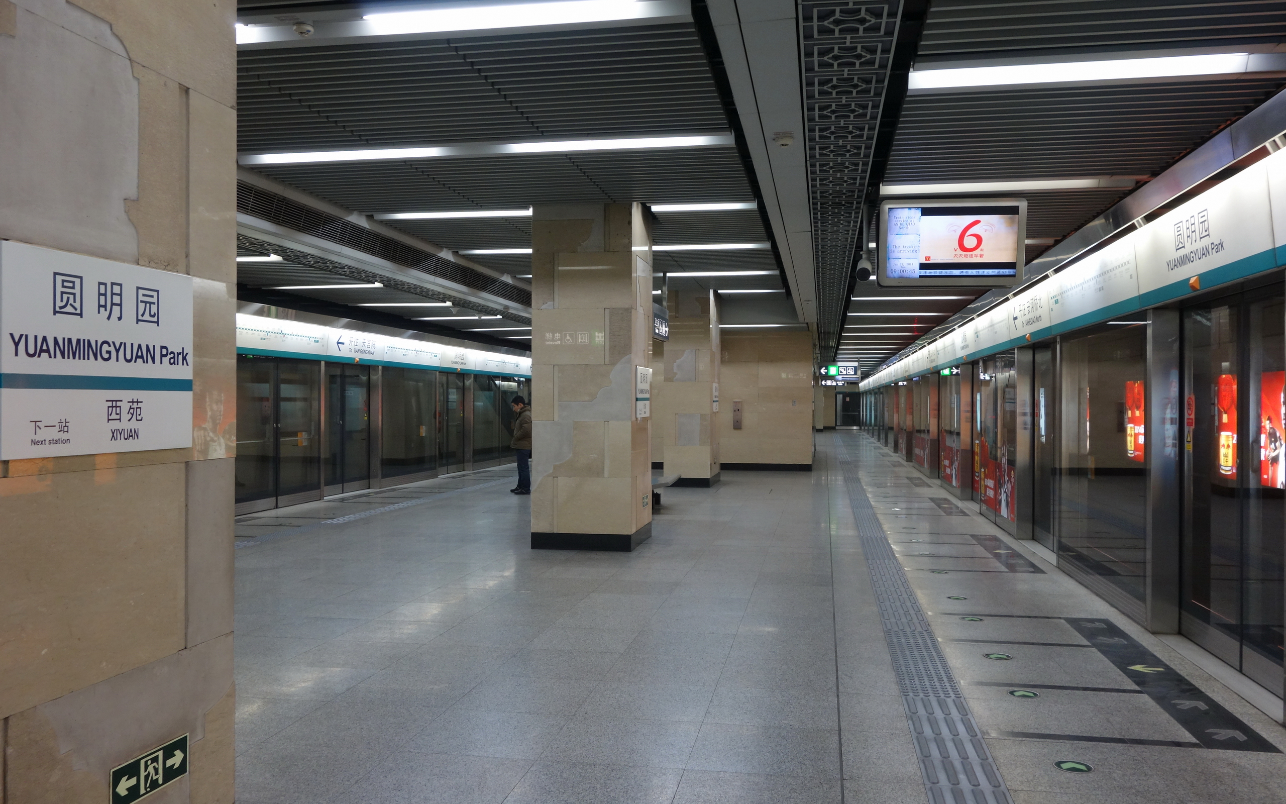 圆明园站岛式站台